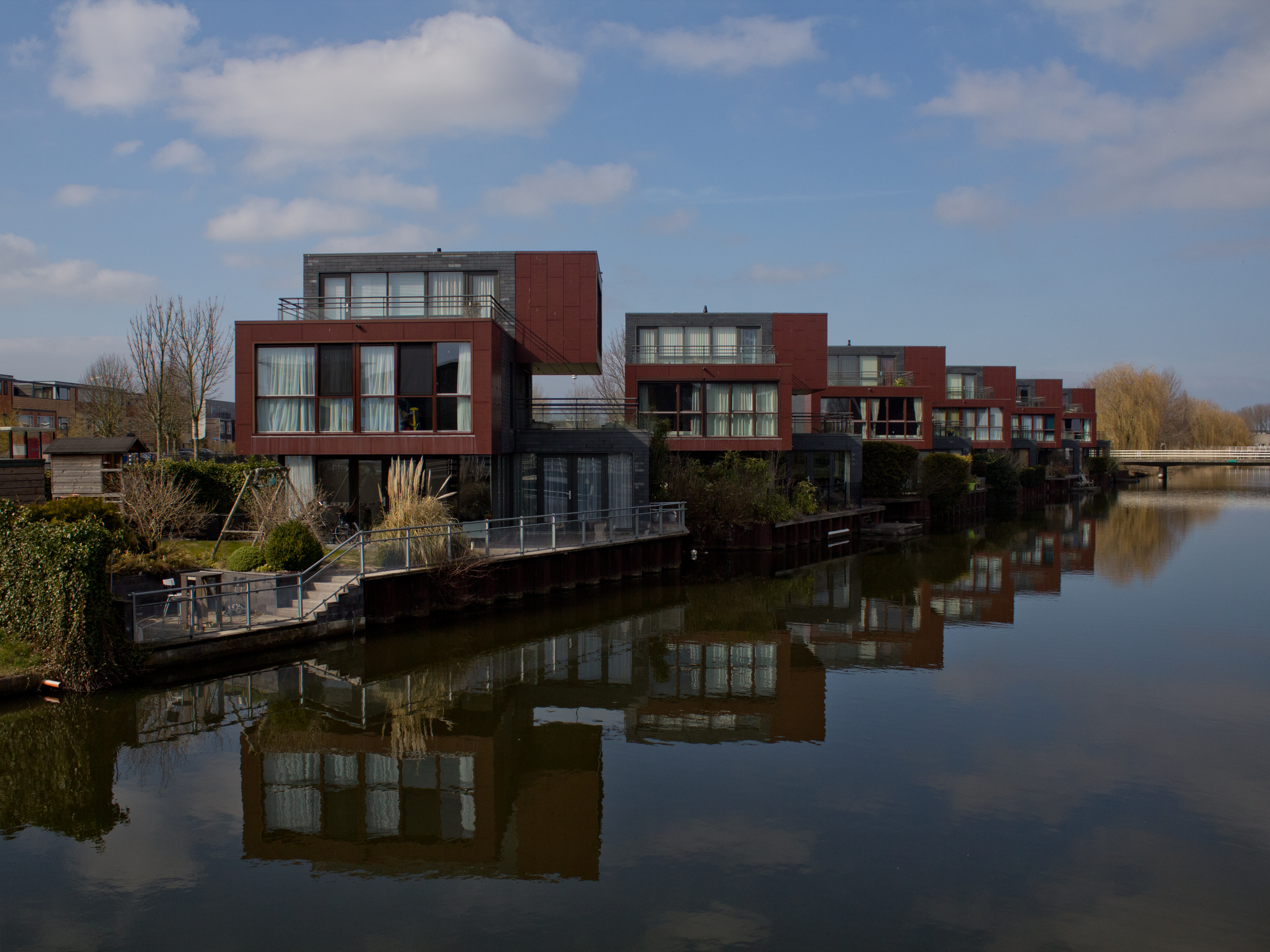 Almere Buiten, Eilandenbuurt, Ter hoogte van het Martiniquepad.